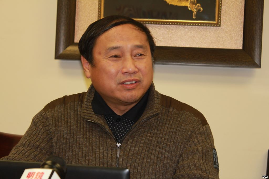 中國民主黨全國委員會主席王軍濤出席紀念胡耀邦誕辰100周年討論會。